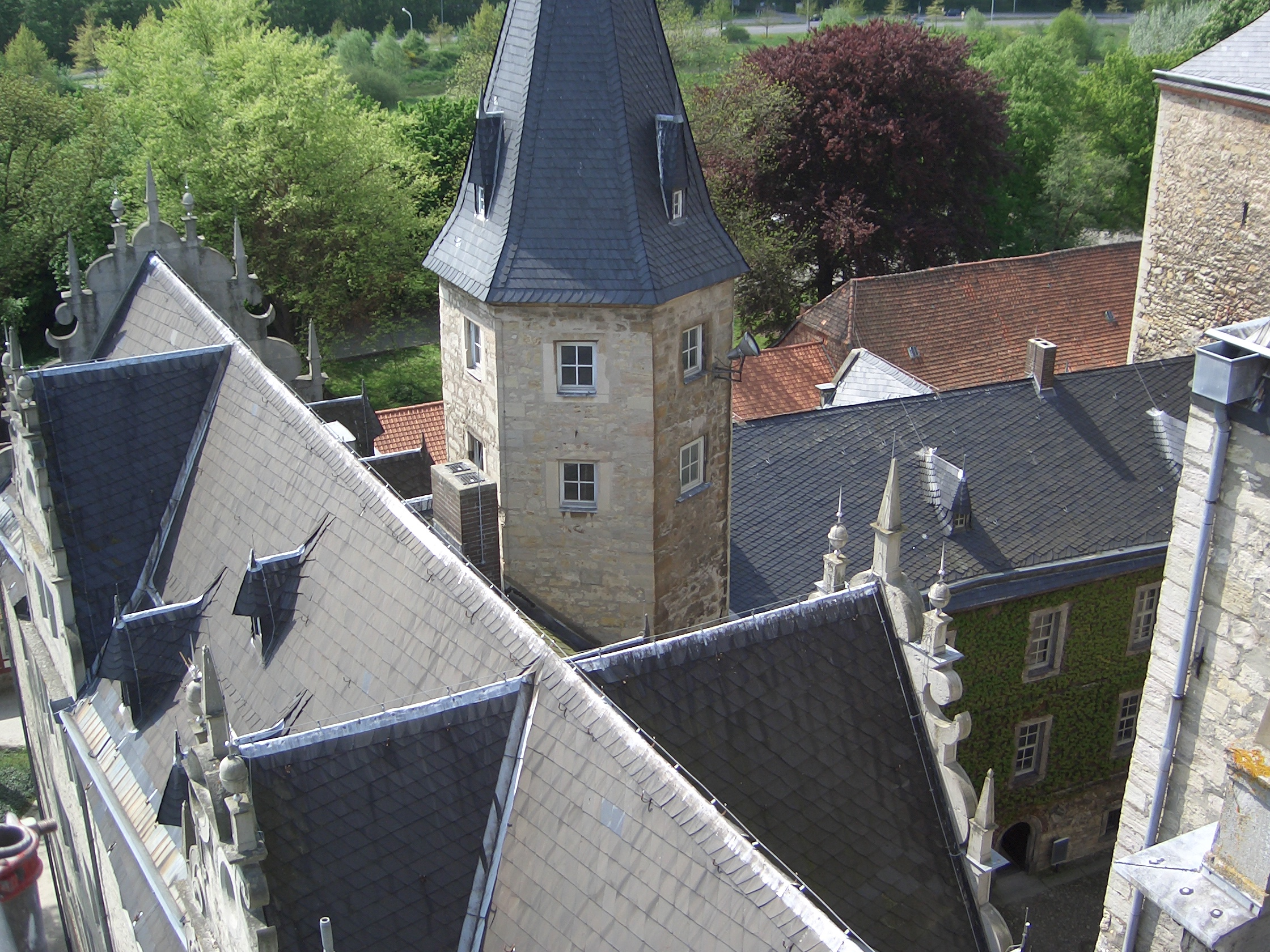 Schloss Wolfsburg, Suedwest-Ecke und Turm von oben, Dachlandschaft